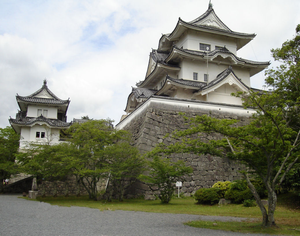 Iga-Ueno Catsle